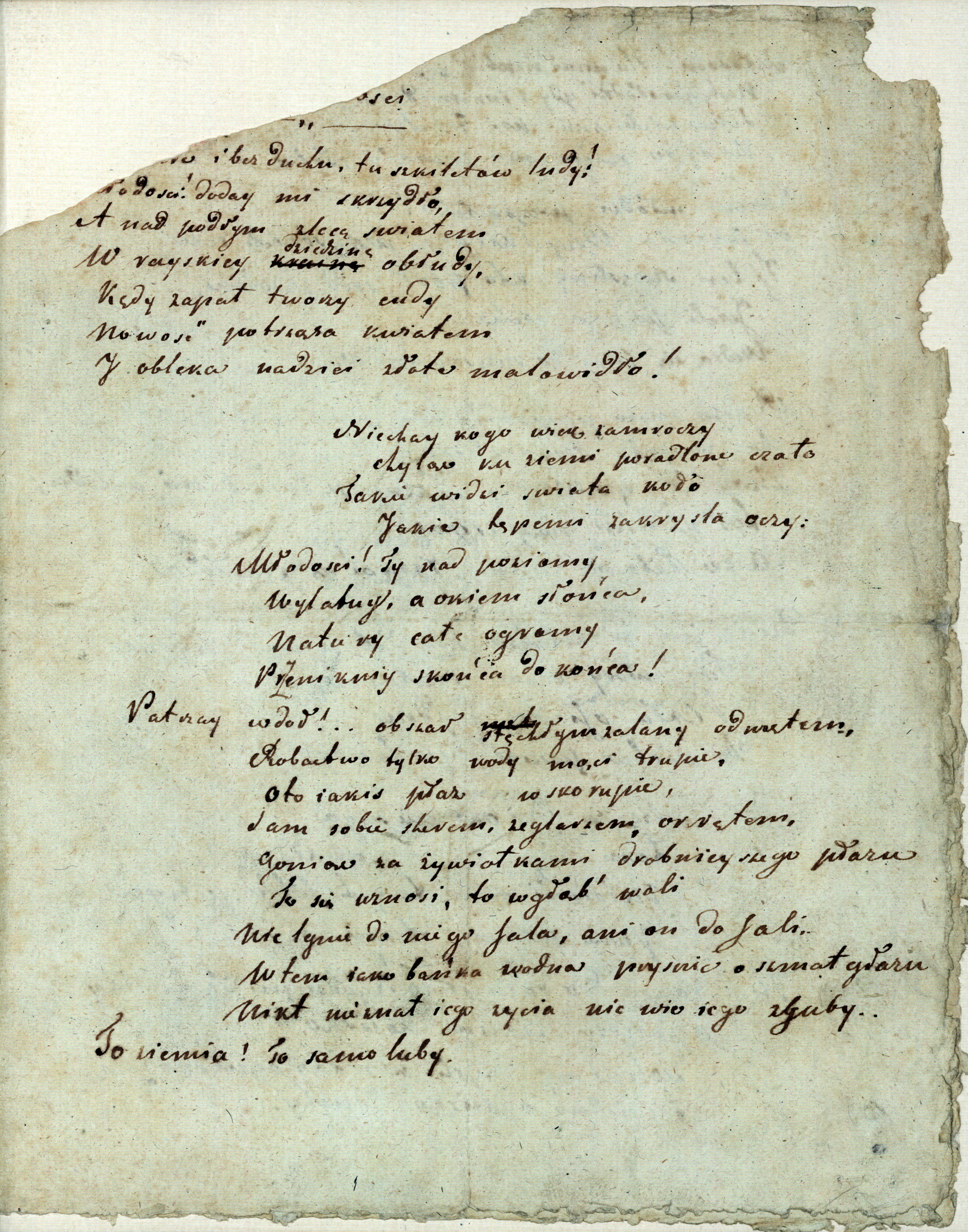 Manuscript of Oda do młodości ("Ode to Youth") by Adam Mickiewicz (page 1)